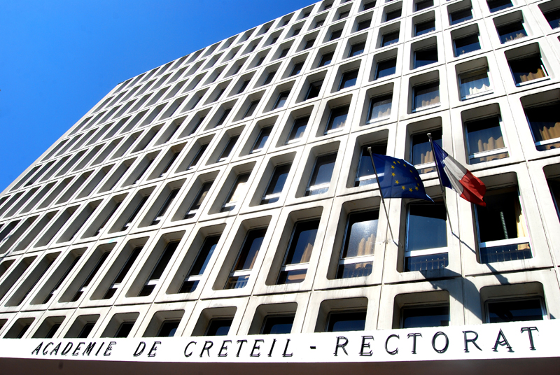 Français cadien: Façade du rectorat de Créteil